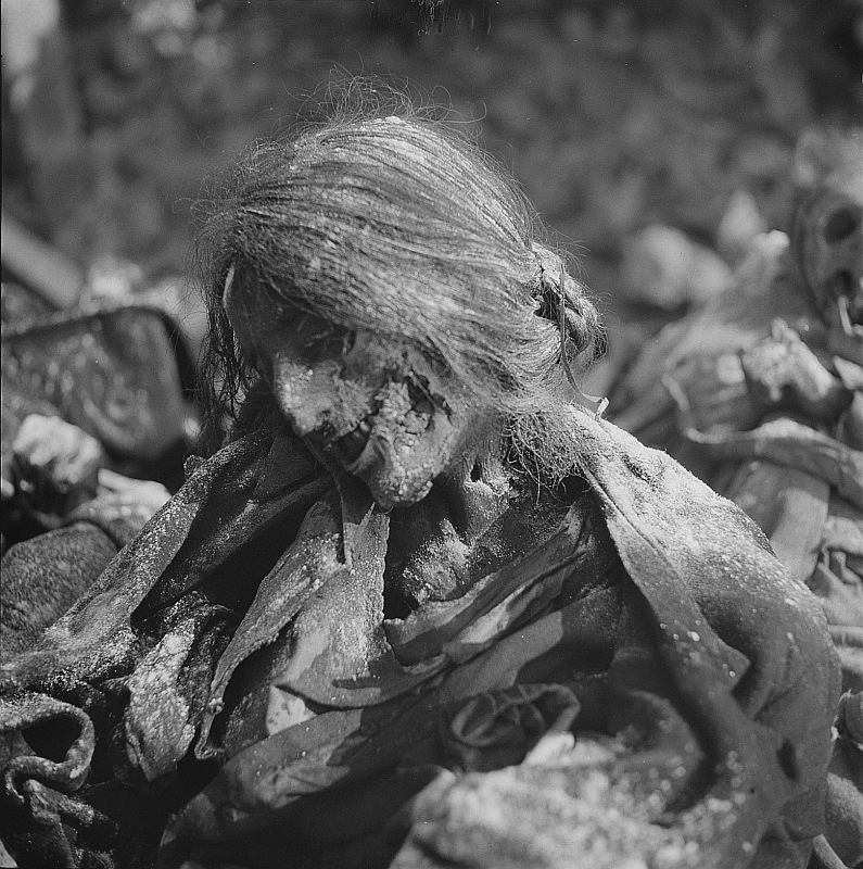 Original image description from the Deutsche FotothekFrauenleichnam in einem Luftschutzkeller